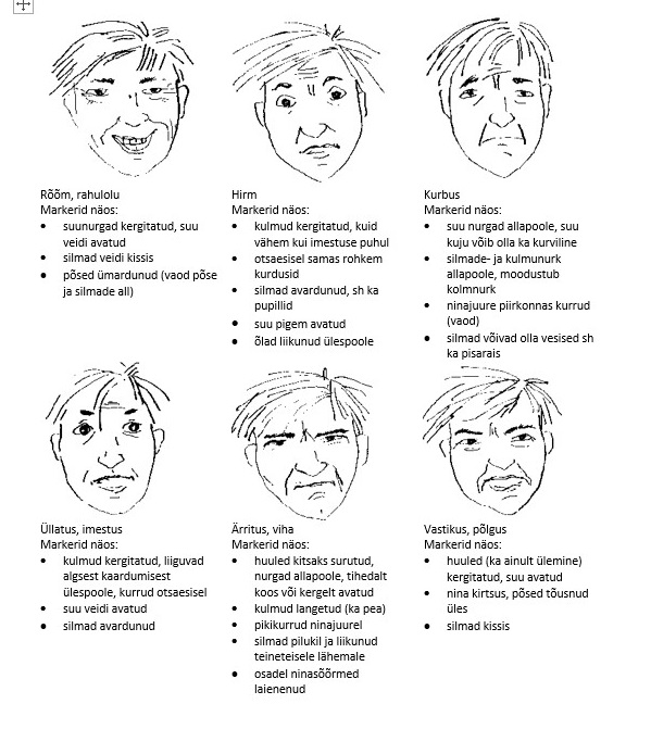 Kuue baasemotsiooni miimilised väljendused koos markeritega